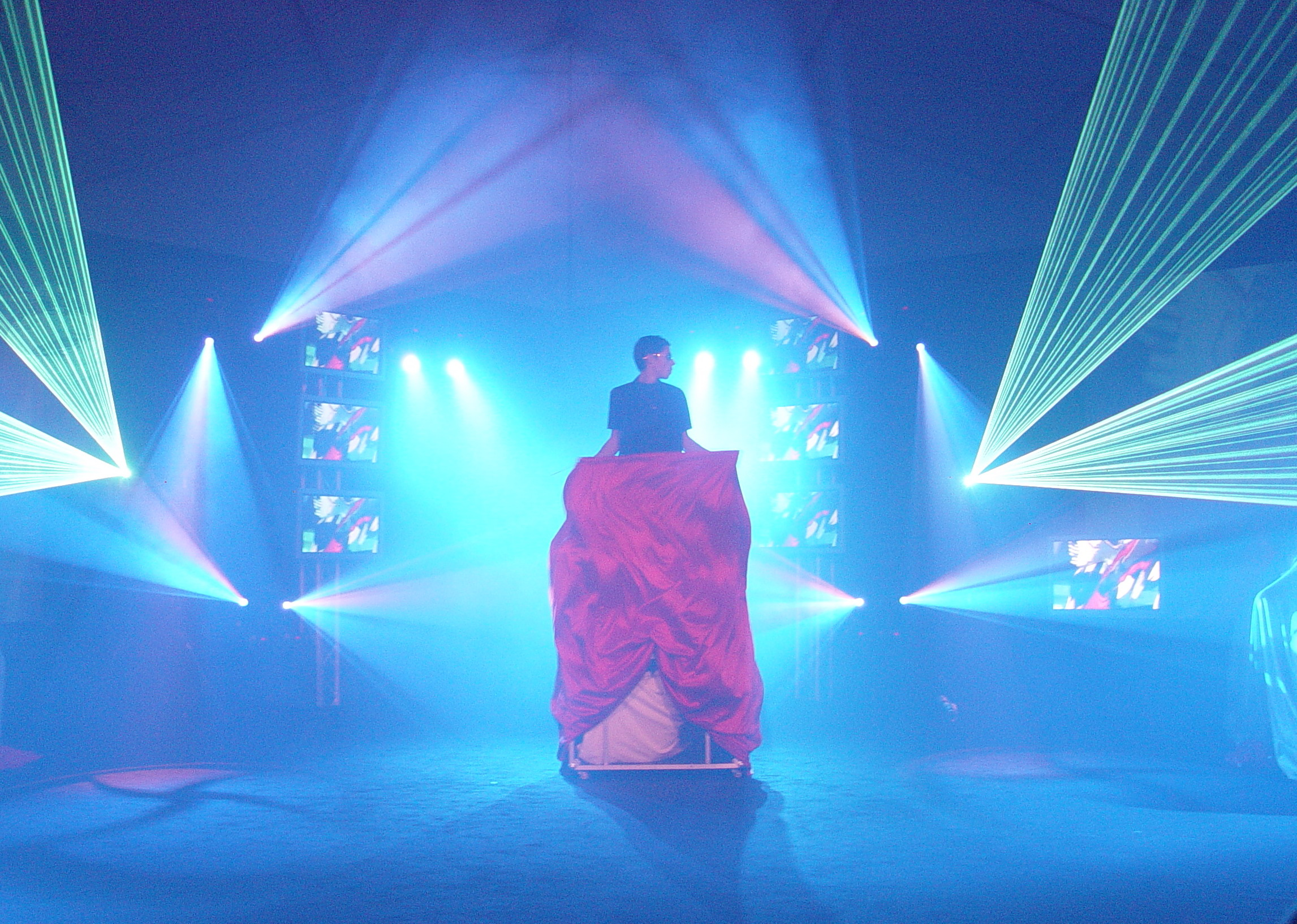 Pokaz specjalny grupy Metamorphosis podczas premiery Peugota 308 w Sopocie, fragment spektaklu grupy Metamorphosis